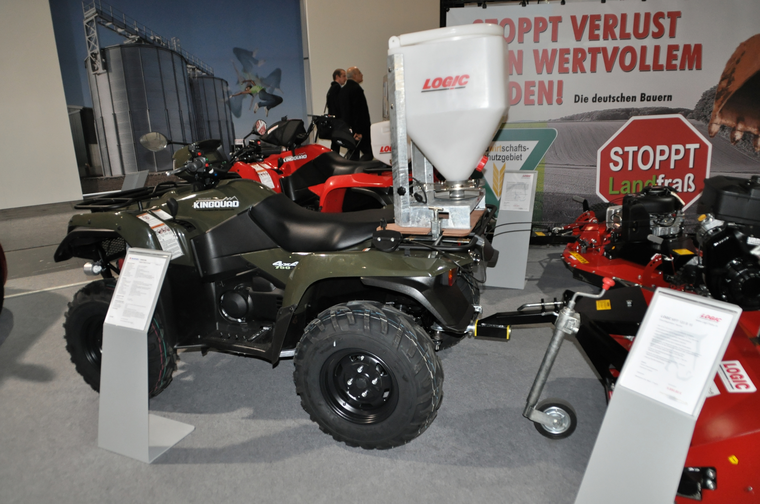 Bilder von der Agritechnica 2011 Dieses Foto entstand durch die Mithilfe der Wikimedia Deutschland e. V. bei der Akkreditierung als Fotograf. Wikimedia Deutschland e. V. hilft den Freiwilligen der Wikipedia bei der Erstellung von freien Inhalten.